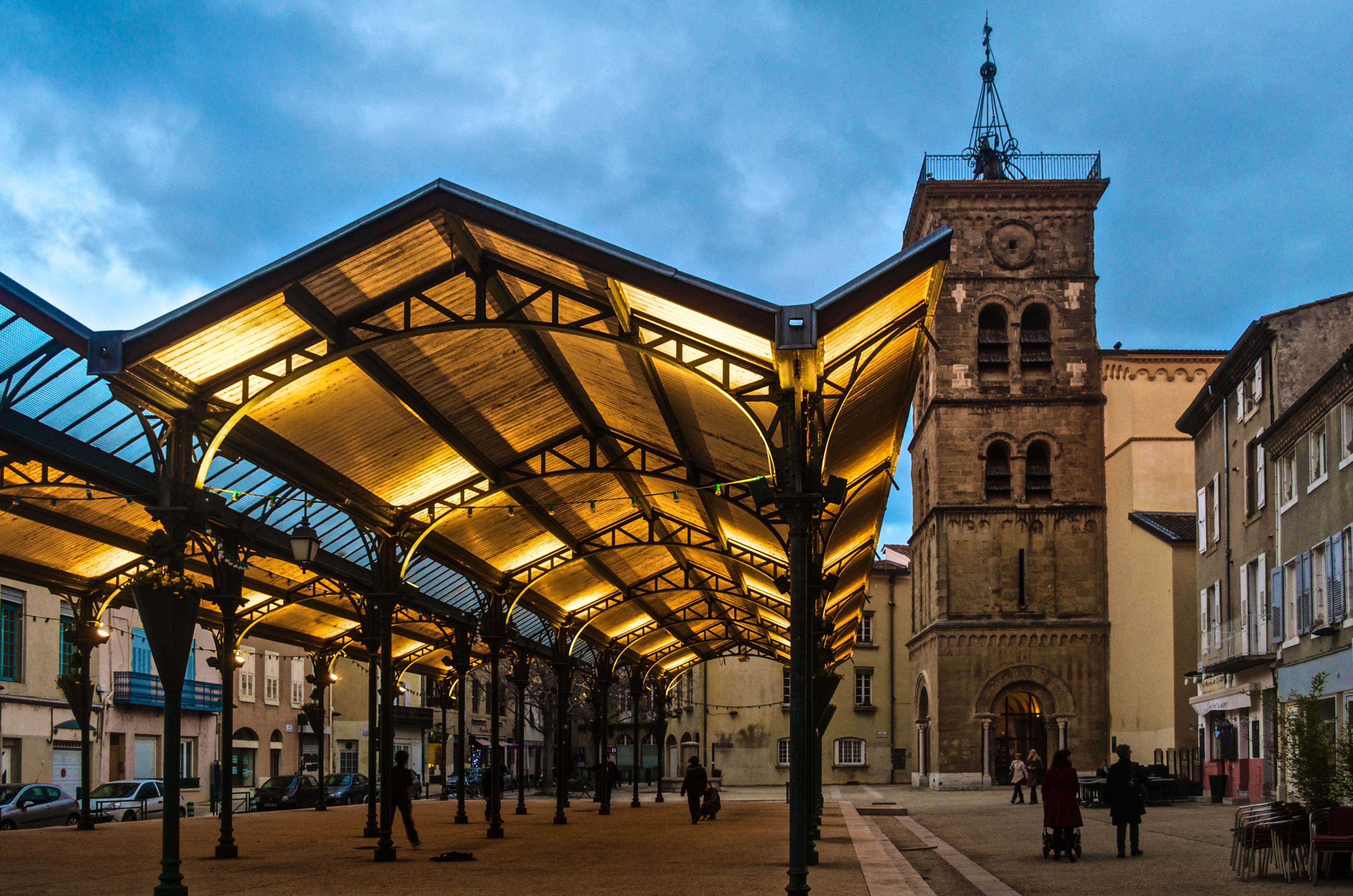 Valence, Drôme, France. Place Saint-Jean, halle et église Saint-Jean